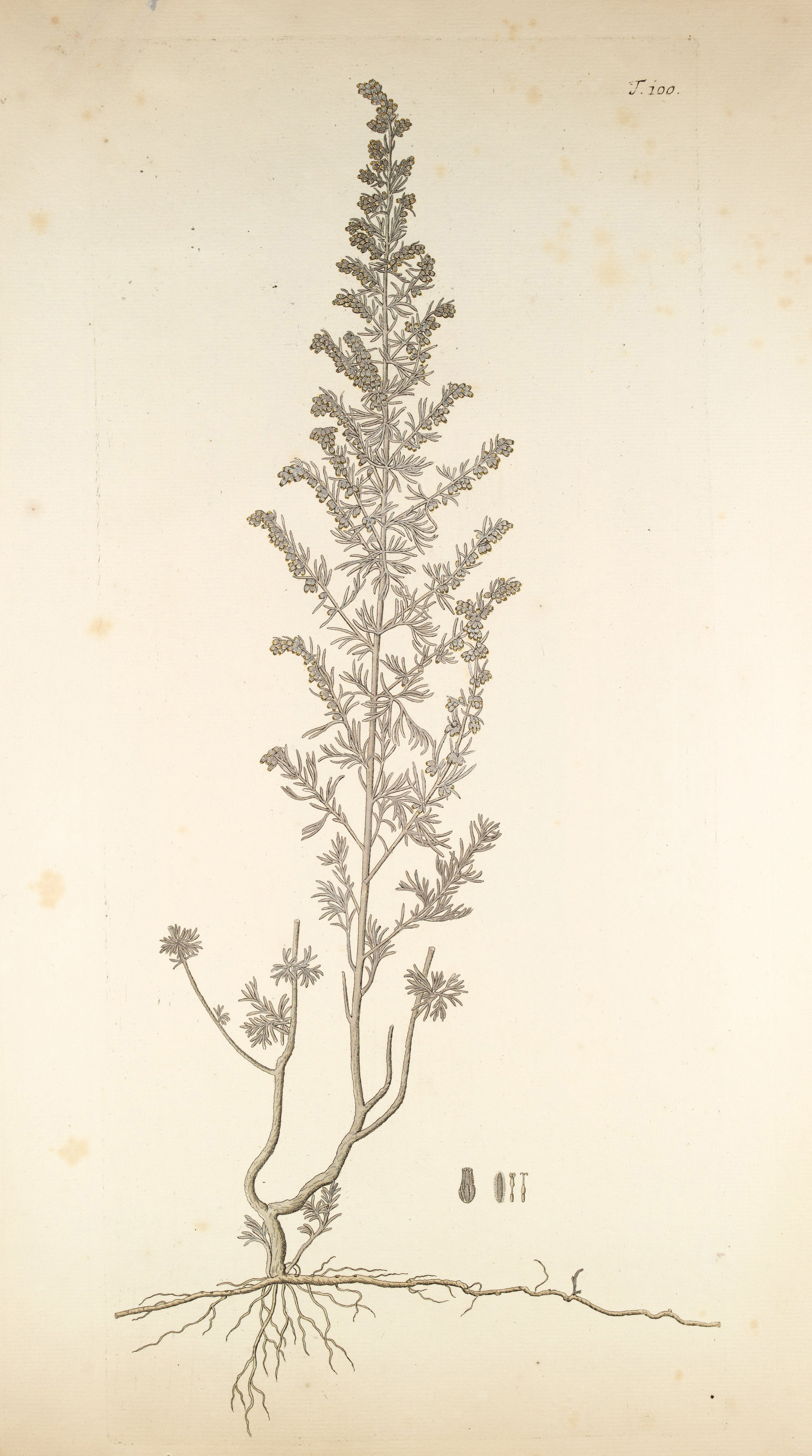 Legende: Ganze Pflanze. Körbchen (vergr.). Inneres Hüllblatt (vergr.). Innere zwittrige Röhrenblüte (vergr.). Äußere weibliche Röhrenblüte (vergr.).